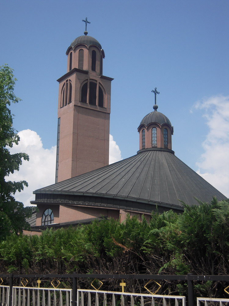 Rebrovačka crkva